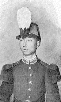 Général Pao-Tchao Dan